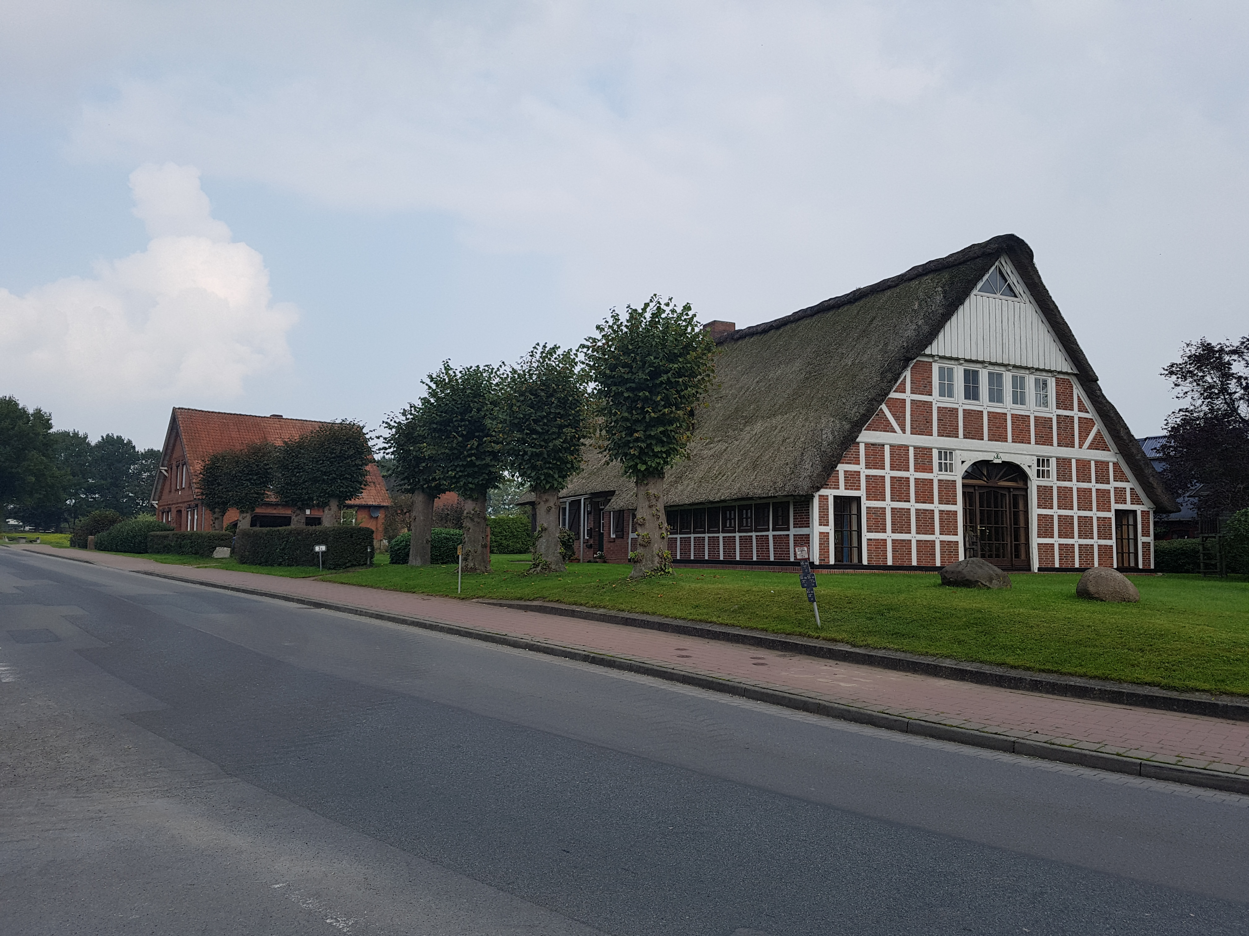 Ehmalig Buurnhuus in Hollen